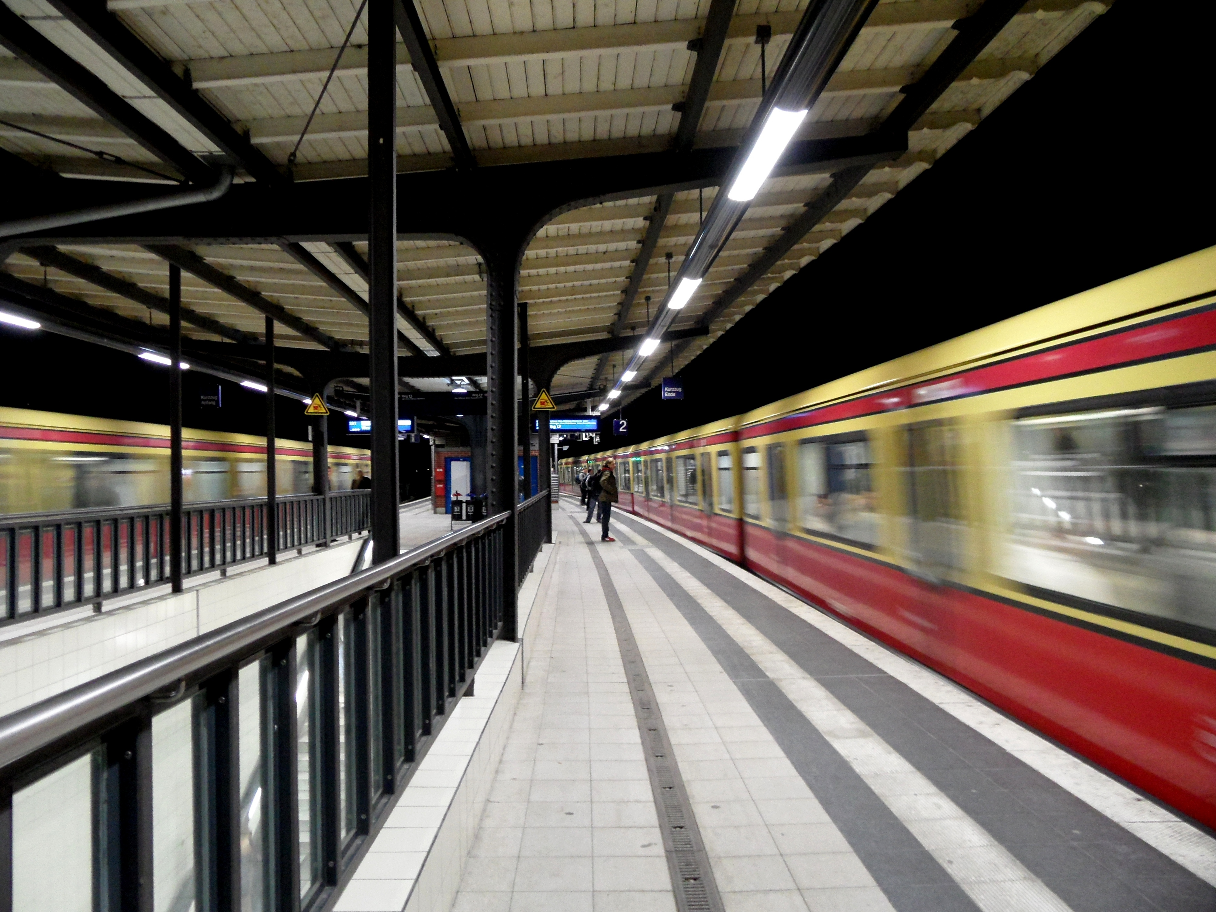 Berlin - S-Bahnhof Sonnenallee - Ringbahn Linien S41 und S42